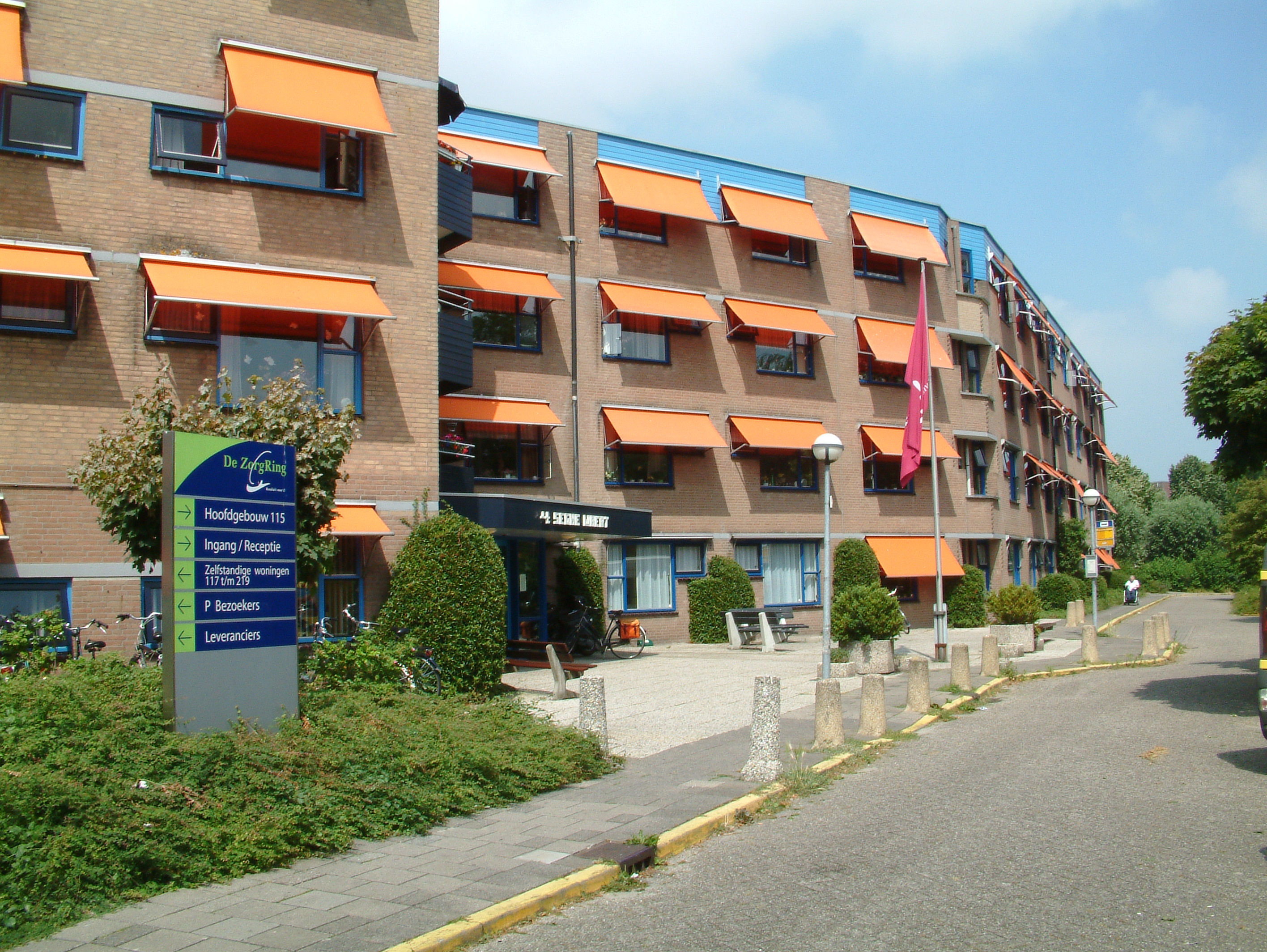 Verpleeghuis 't Seghe Waert in Seghwaert, Zoetermeer